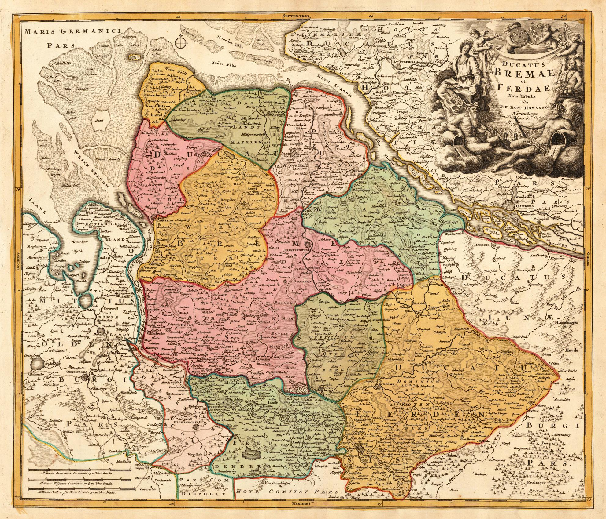 Ducatus Bremae et Ferdae Nova Tabula edita Ioh. Bapt. Homanno Norimbergae Karte des Herzogtum Bremen-Verden, Kupferstich, 49 cm x 57 cm